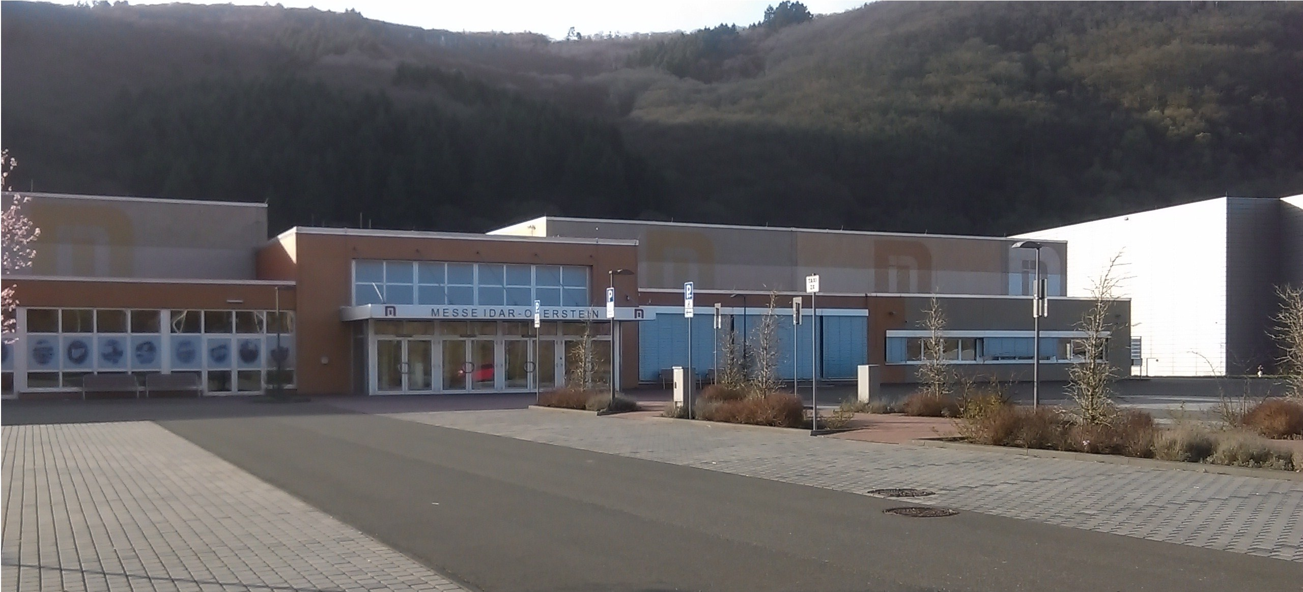 Haupteingang der Messe Idar-Oberstein